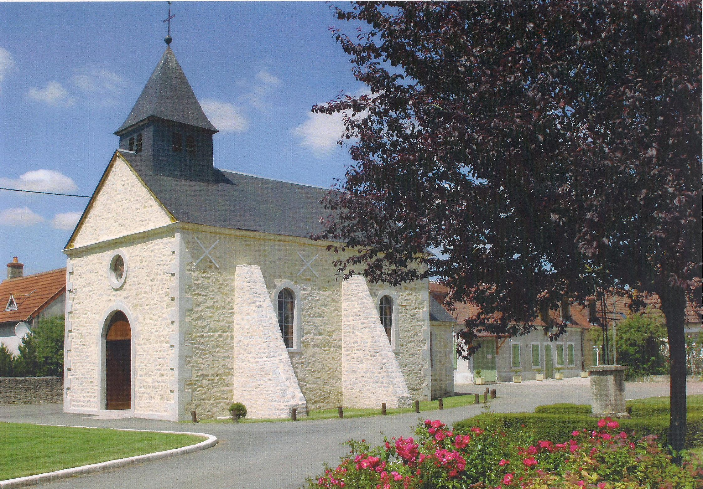 Eglise de Saint Aignan des Noyers (18600)